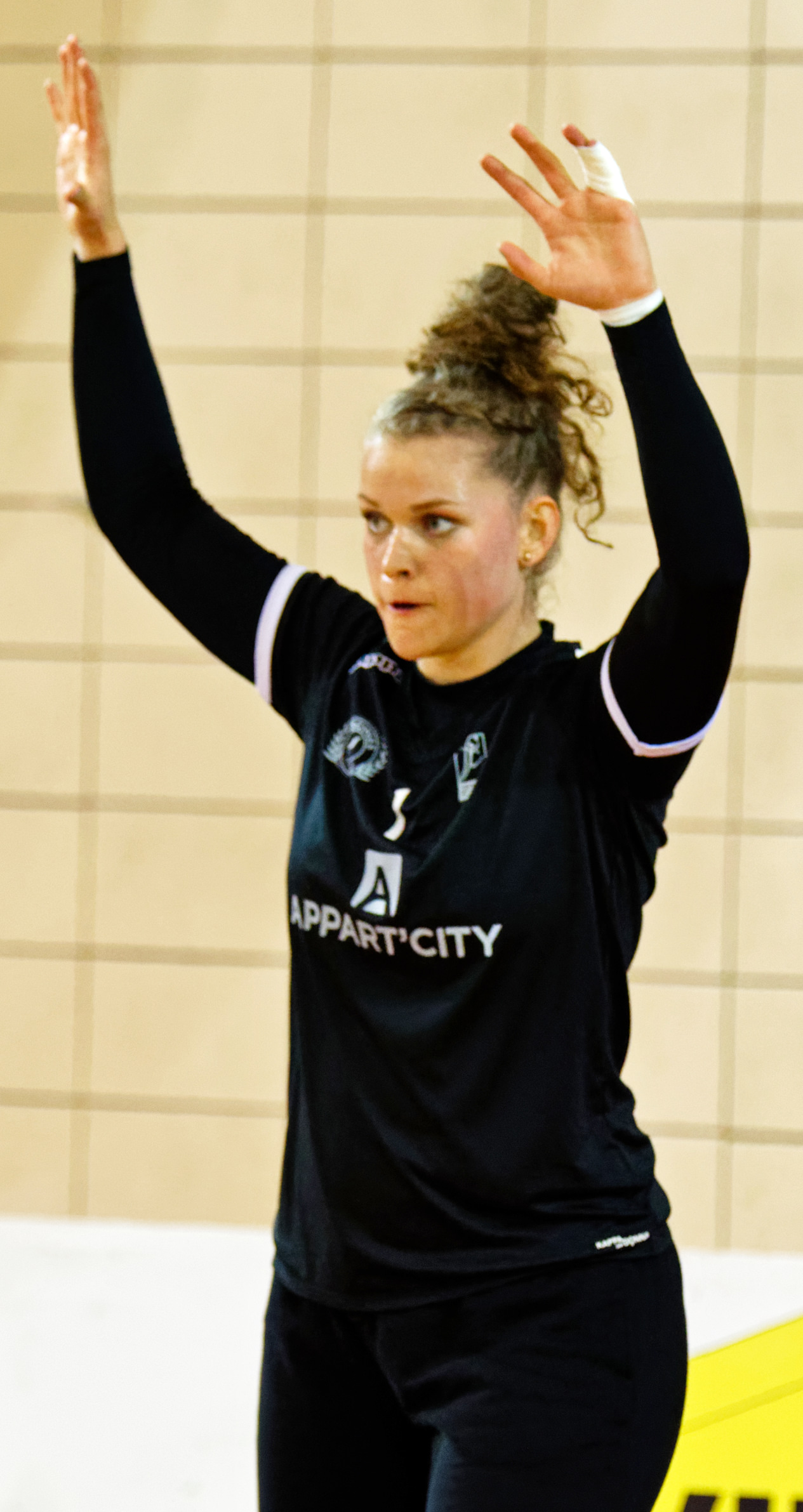 Rencontre de championnat entre Issy Paris Hand et toulon St Cyr. A Issy Les Moulineaux, le 30 septembre 2016.